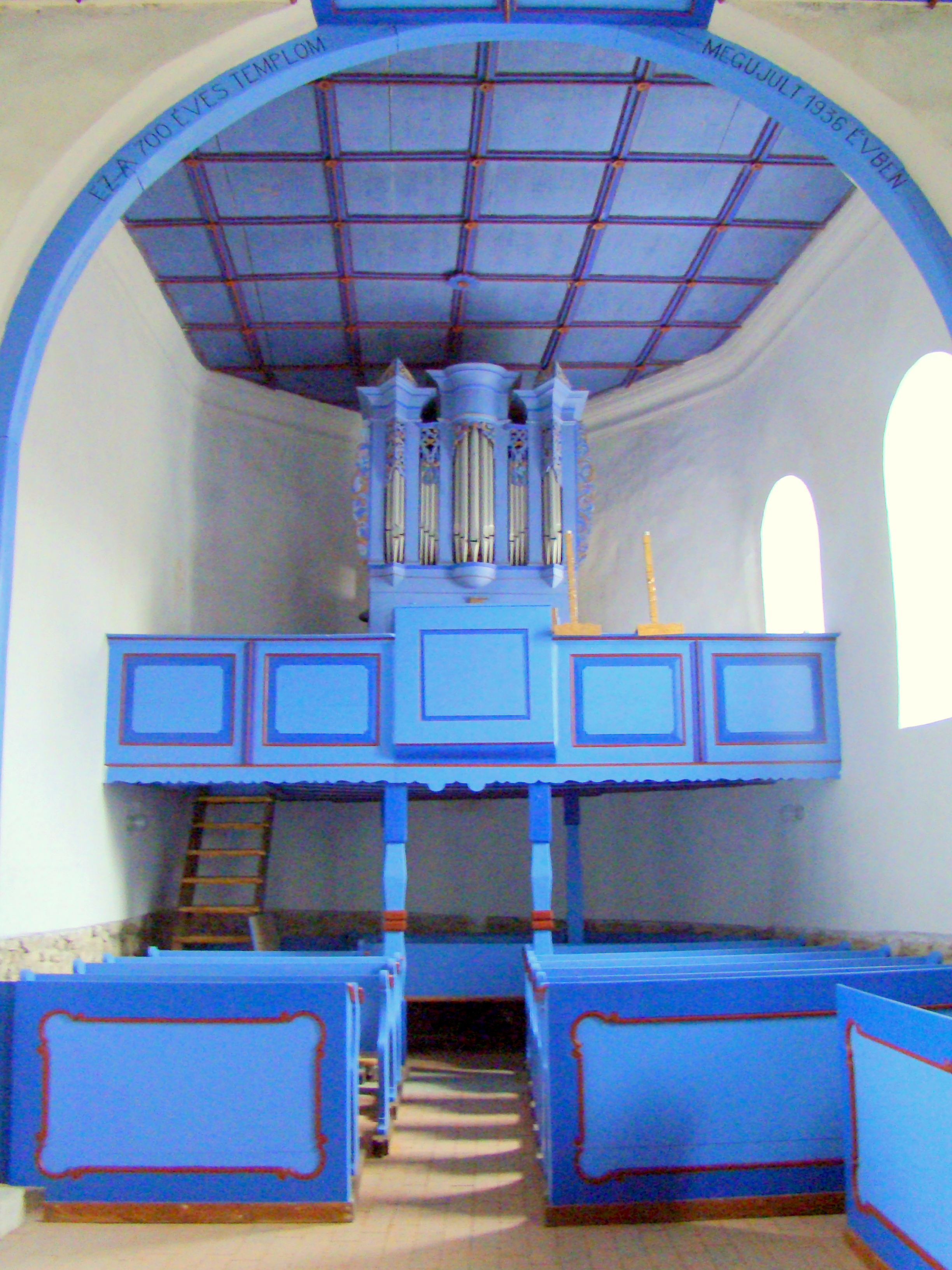 Biserica reformată sat Ghidfalău; comuna Ghidfalău 204 A sec. XIII - XVII, transf. 1787 01